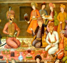 Shah Abbas II